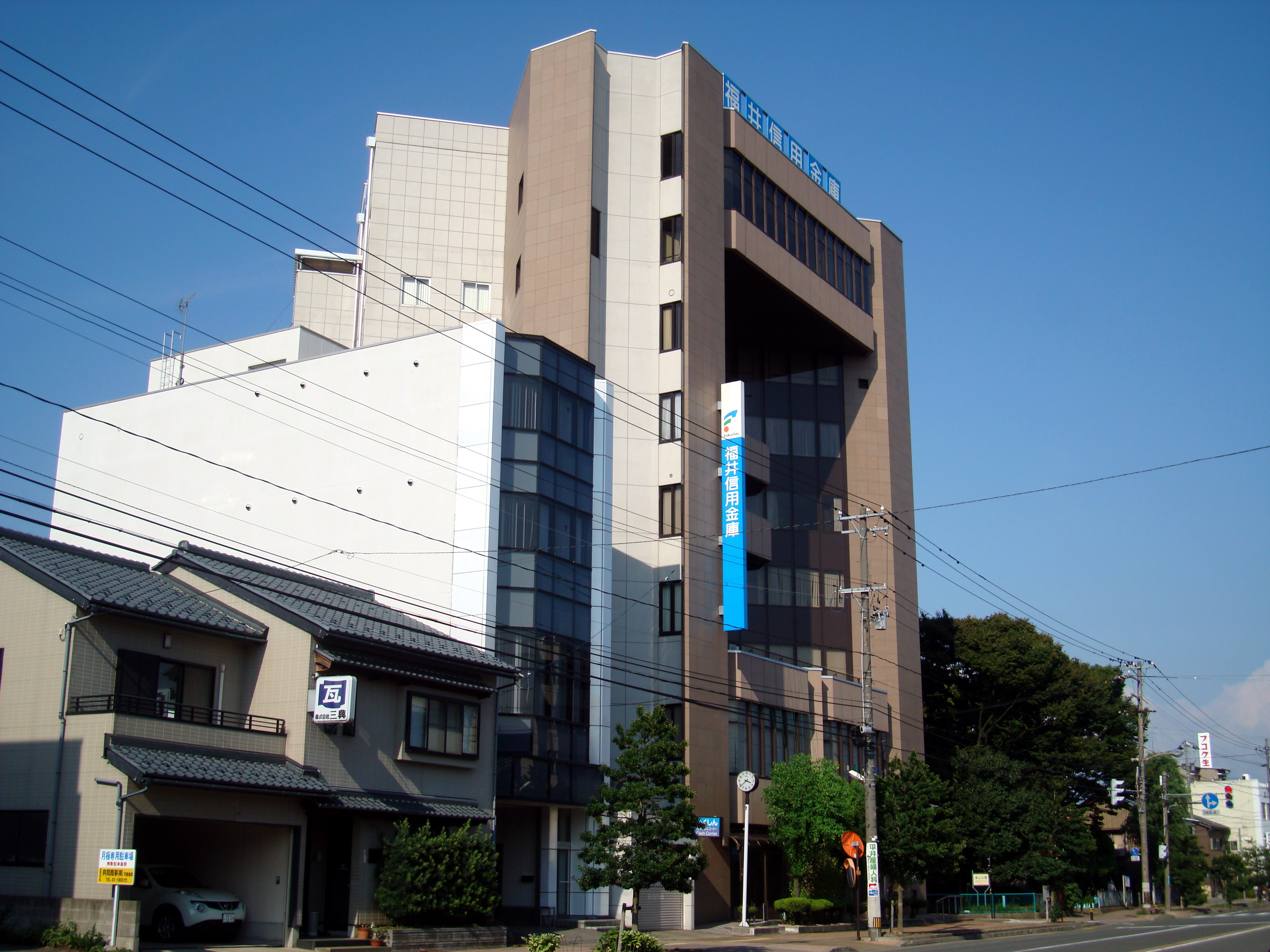 福井信用金庫本店